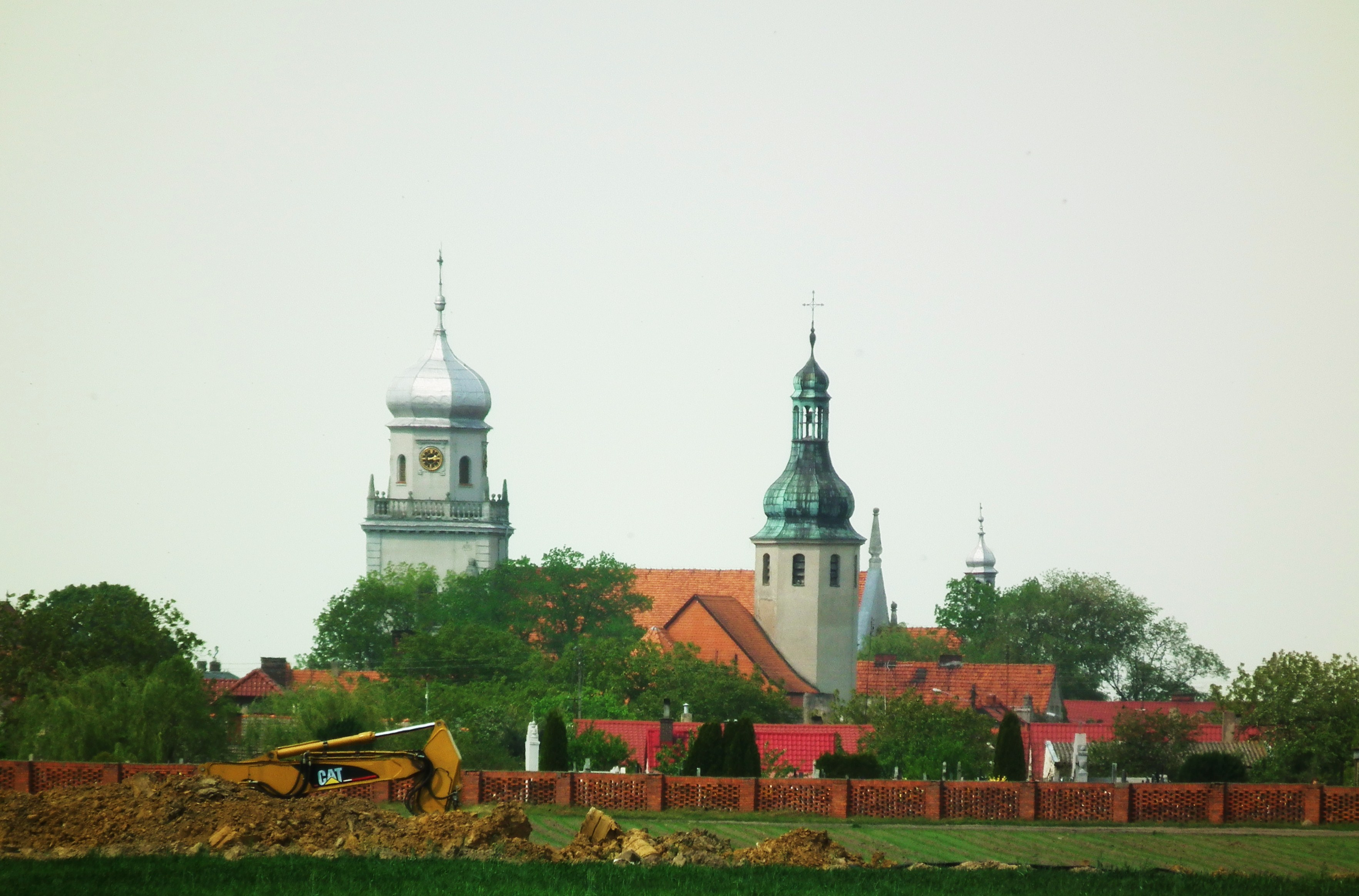 Panorama Sulmierzyc z południa.